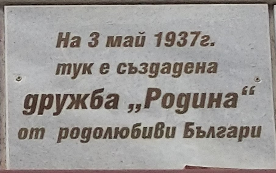 Смолян - читалище Христо Ботев - паметна плоча на Дружба Родина